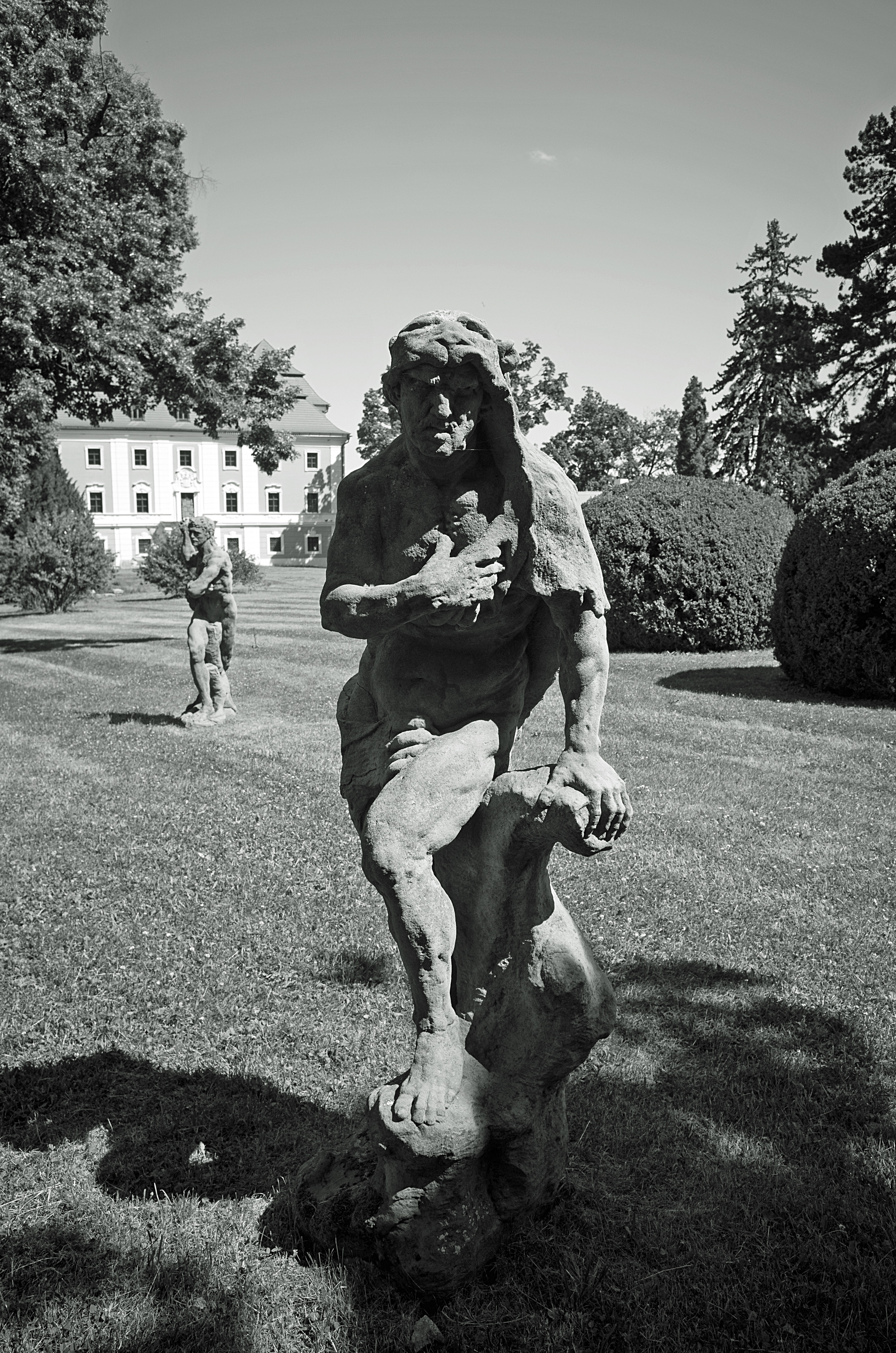 Socha Matyáše Bernarda Brauna ve Valeči.